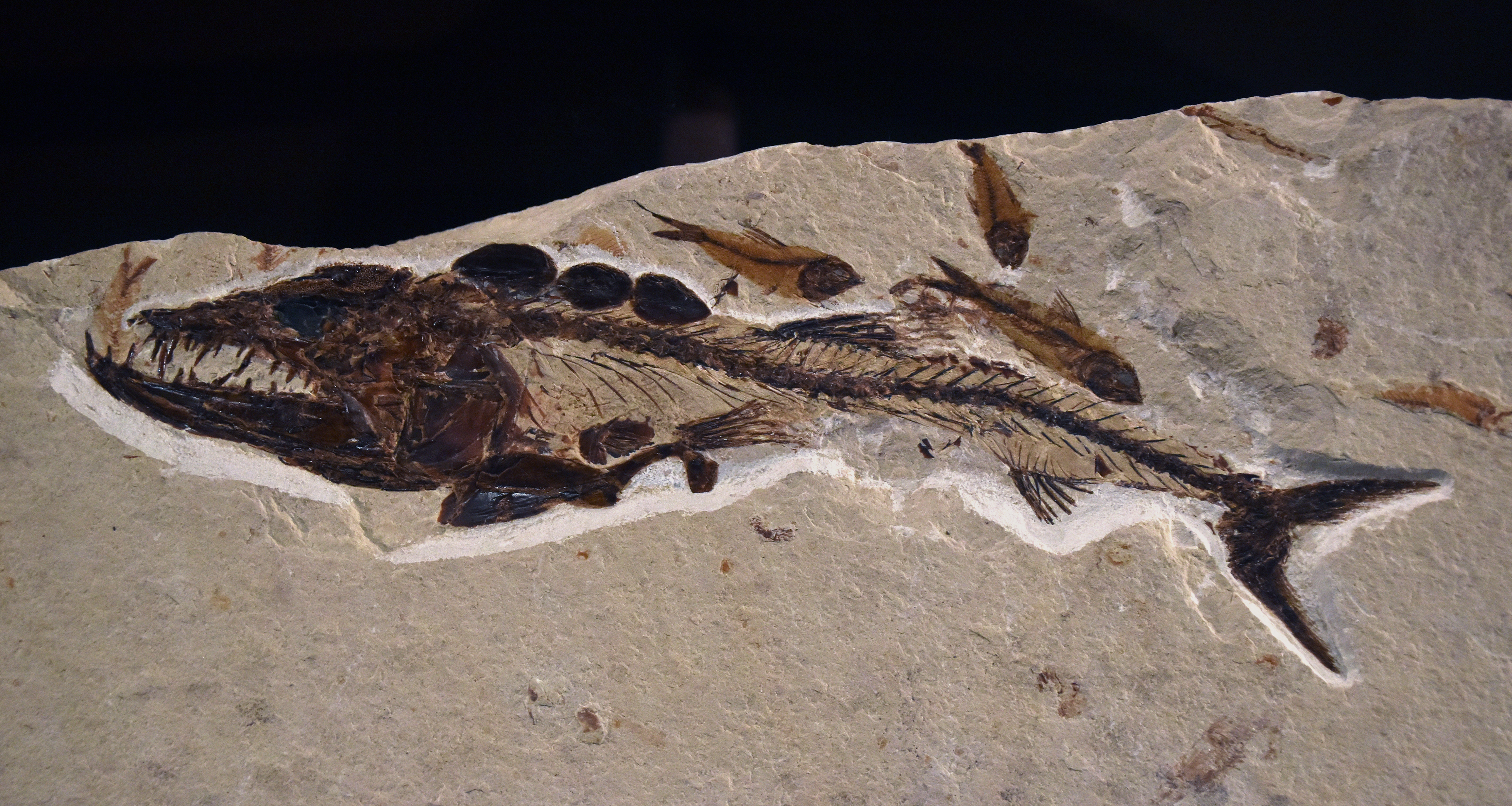 Eurypholis boissieri, Crétacé ( cénomanien, 90 millions d'années ), provenant d'Hakel ( Liban ). Exposé au Muséum d'Histoire Naturelle de Grenoble.